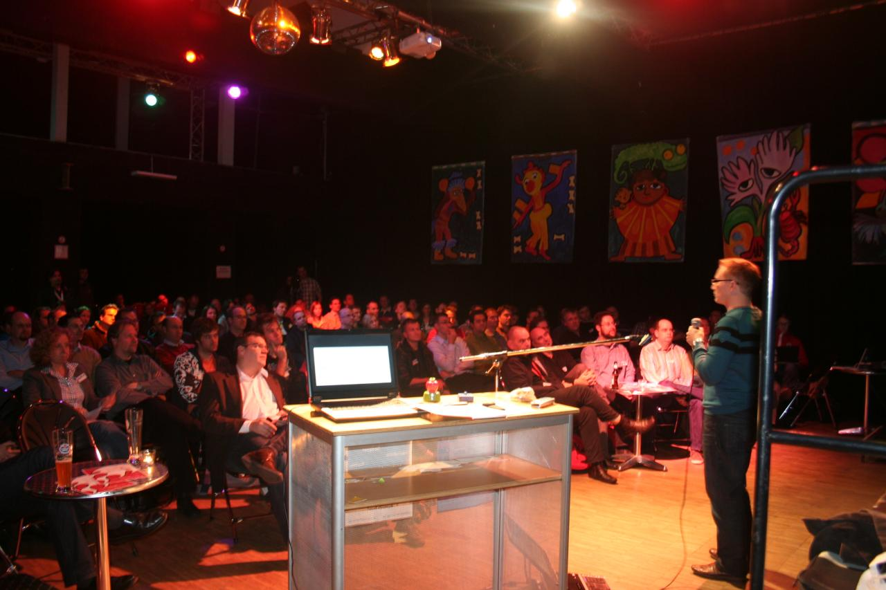 Web Montag am 12.10.2009 in Frankfurt